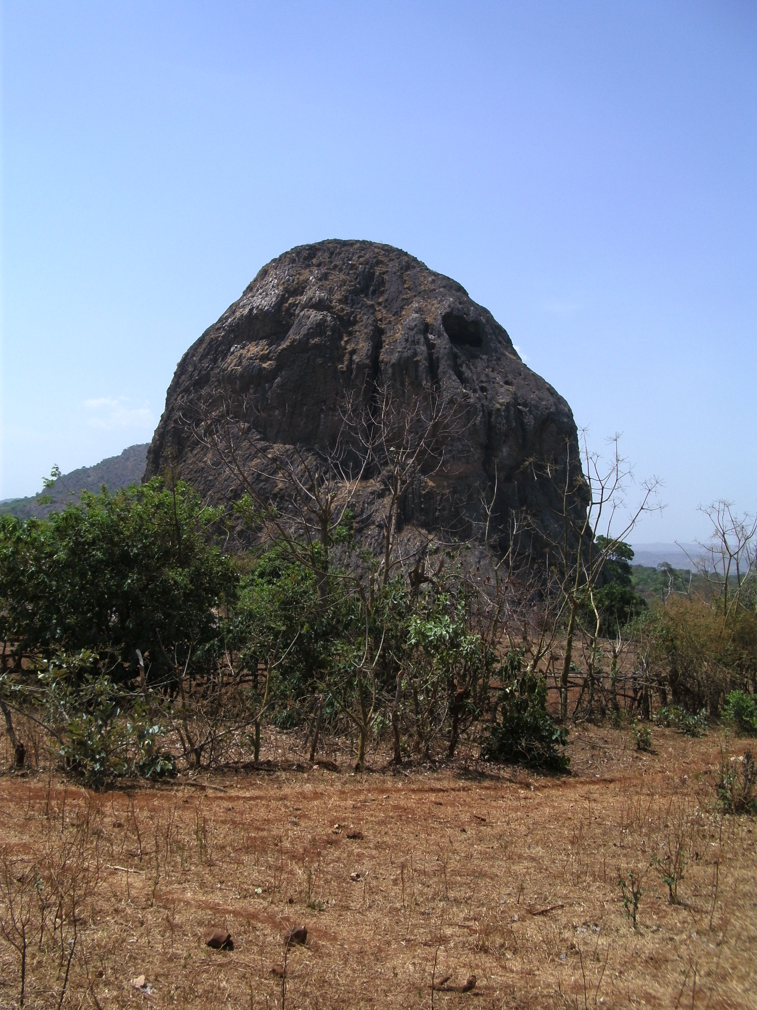 Montagne située près des grottes de Damougare sur l'axe Garoua Boulaï - Ngaoundéré